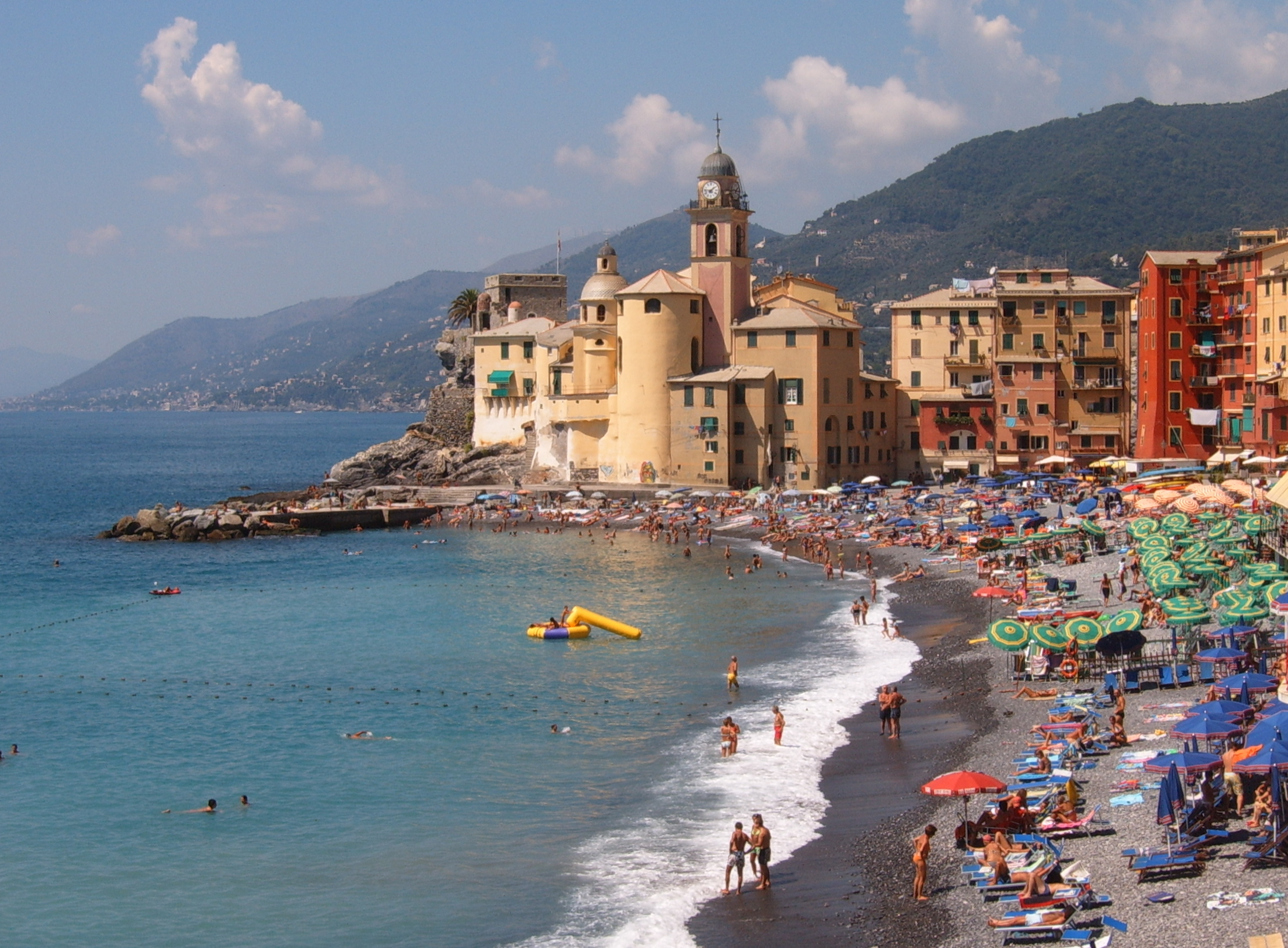 Camogli (Italy)